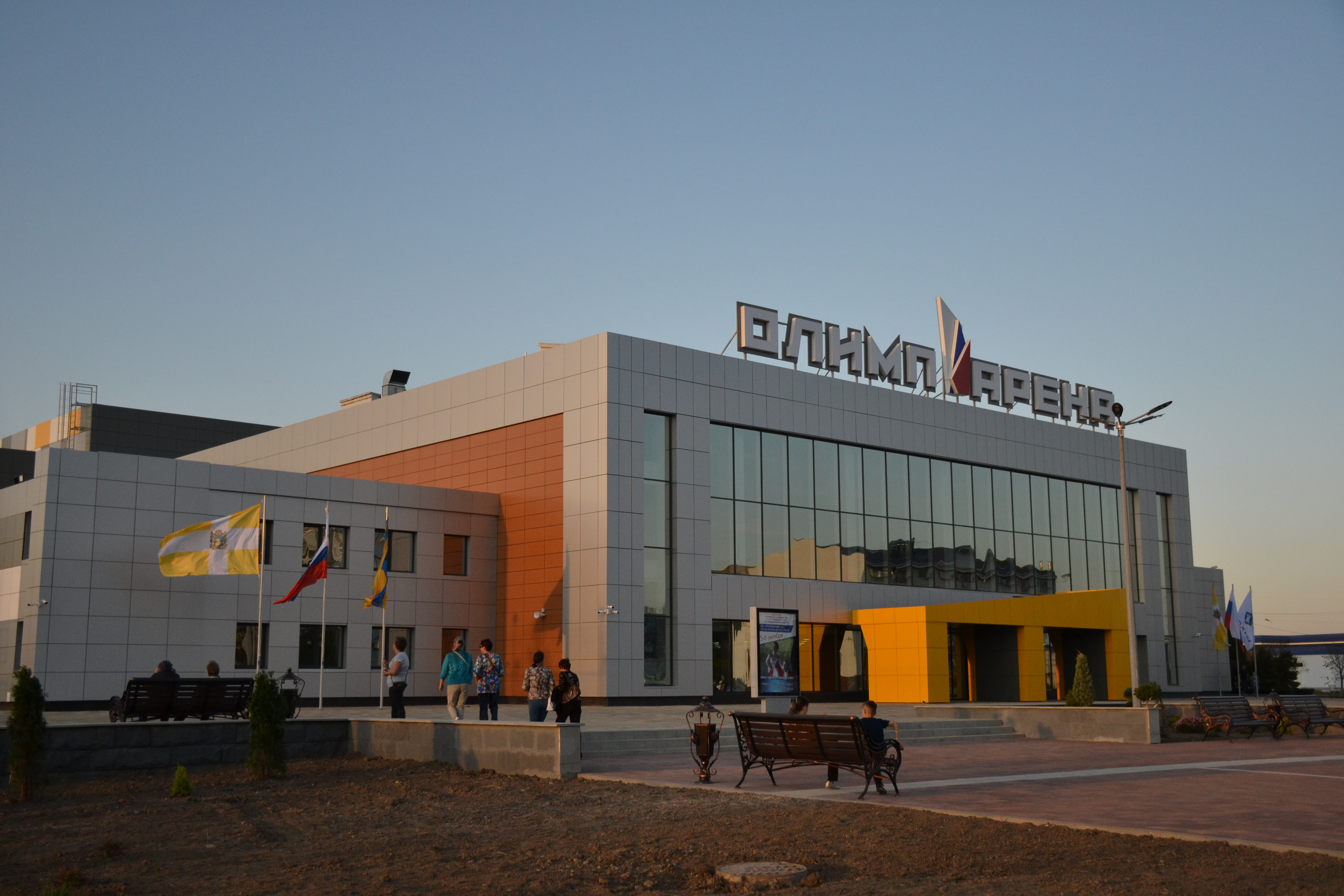 Спортивный комплекс "Олимп" в г. Невинномысске